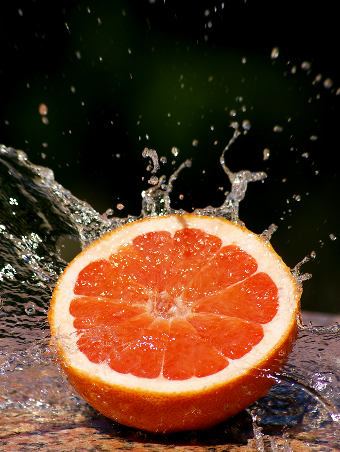 Grapefruit Half